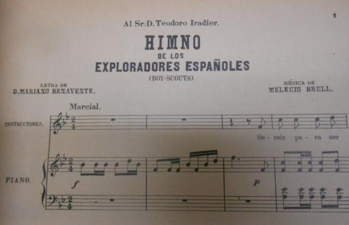 Primeras notas del himno de los Exploradores de España. Letra de Mariano Benavente y música del compositor Melecio Brull.